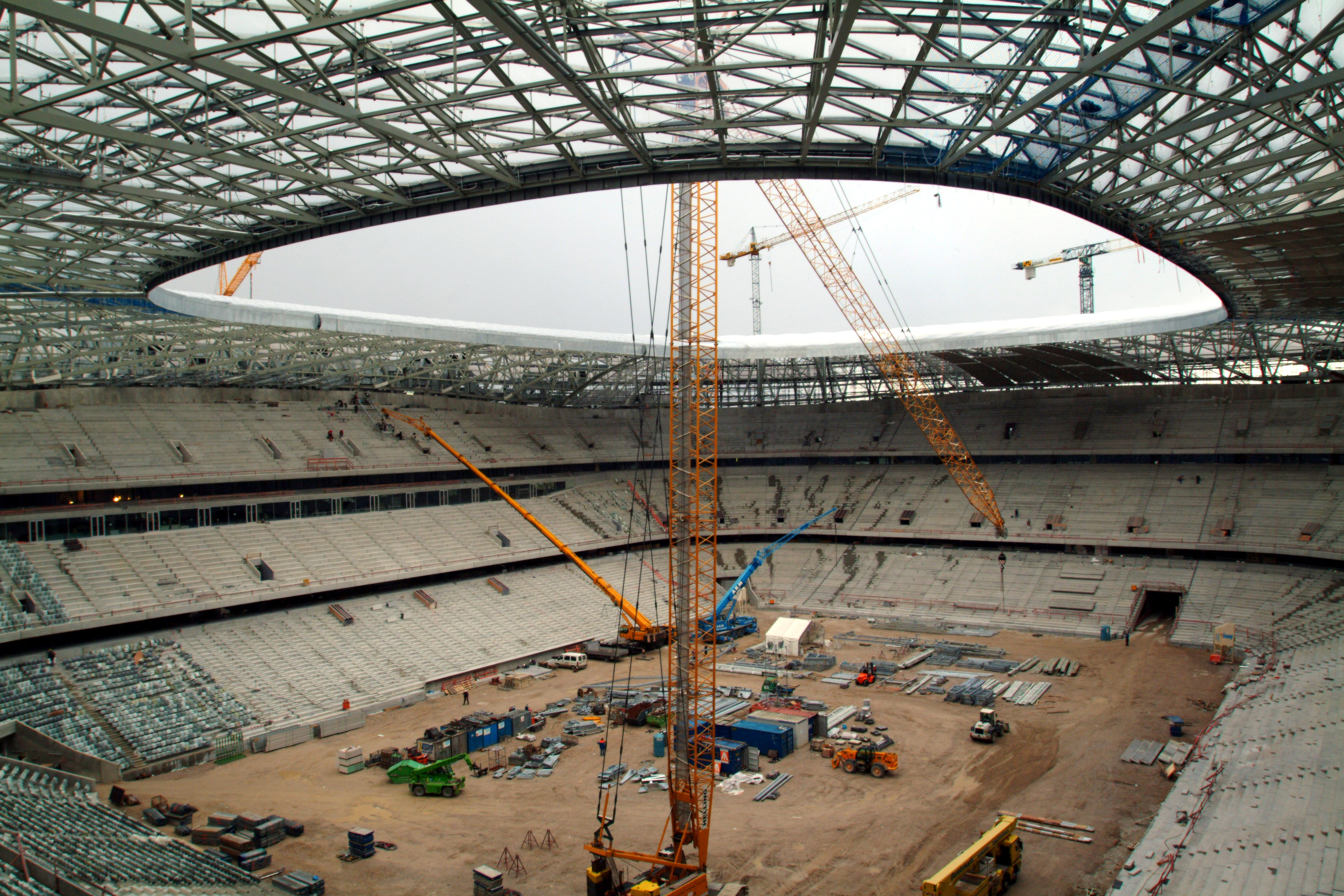 Allianz Arena in Munich under Construction